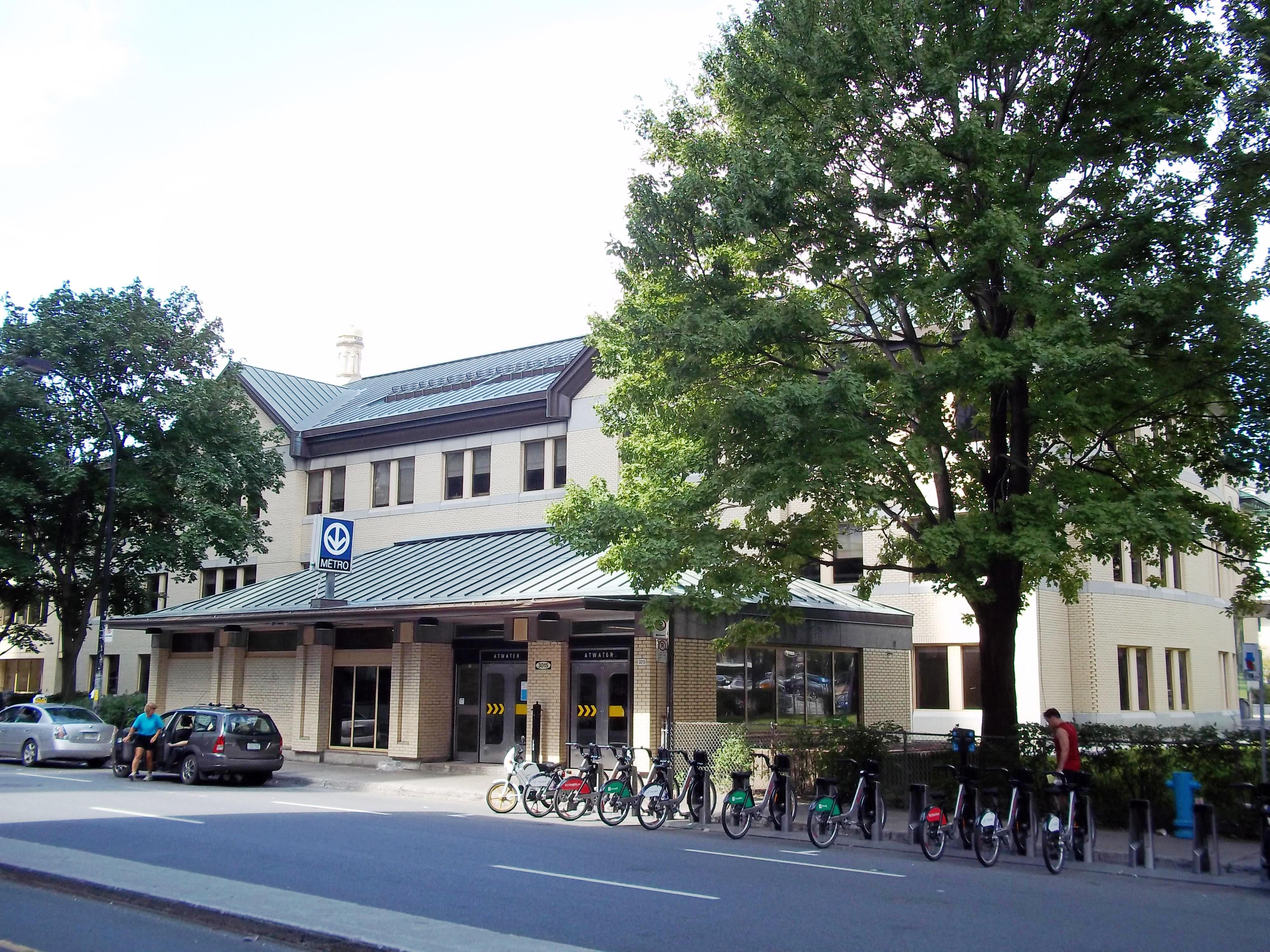 Collège Dawson, Montréal